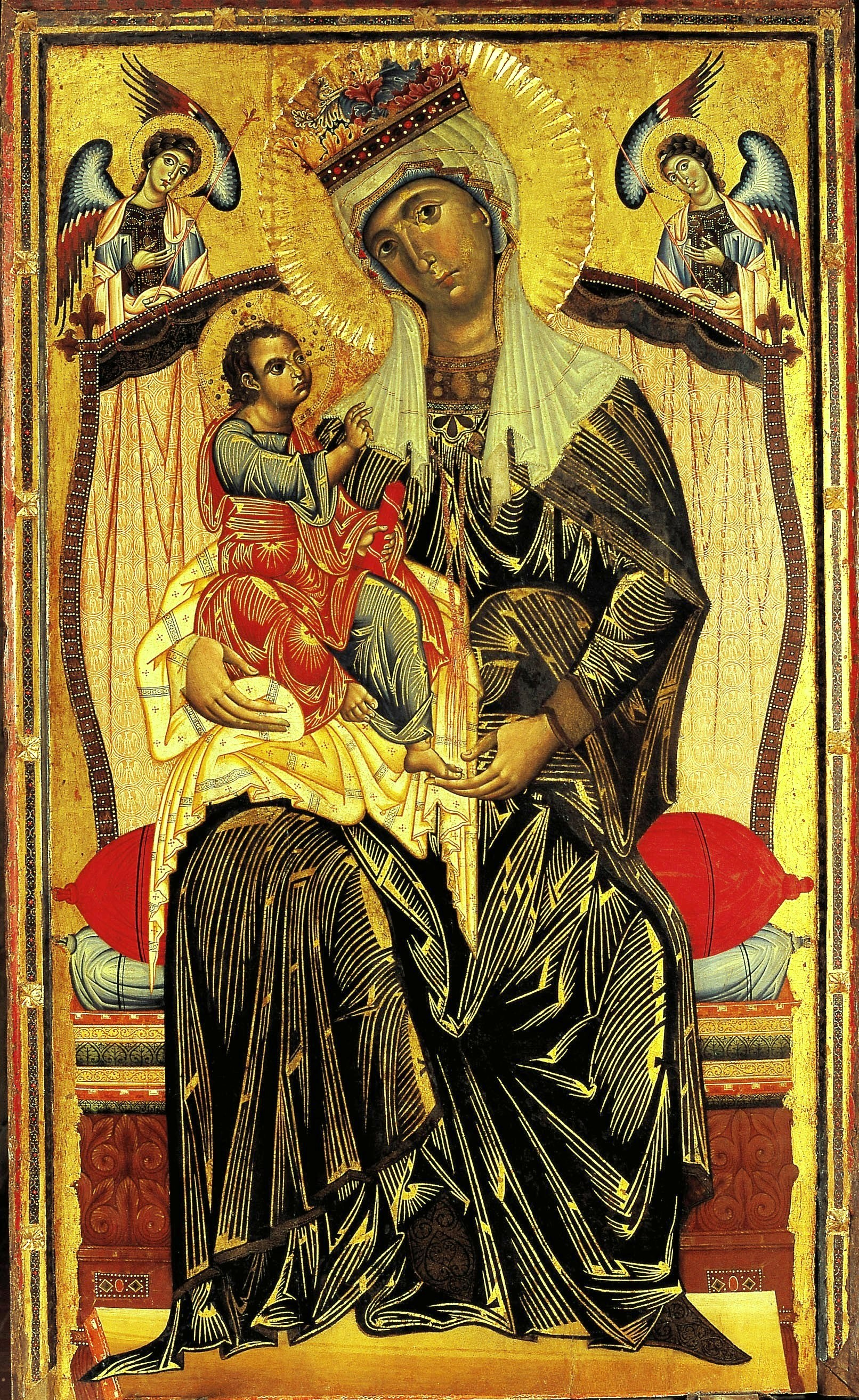 Madonna